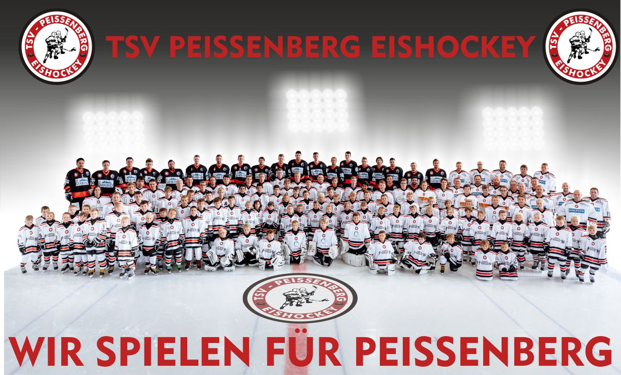 Die gesamte Abteilung Eishockey des TSV Peißenberg auf einem Foto